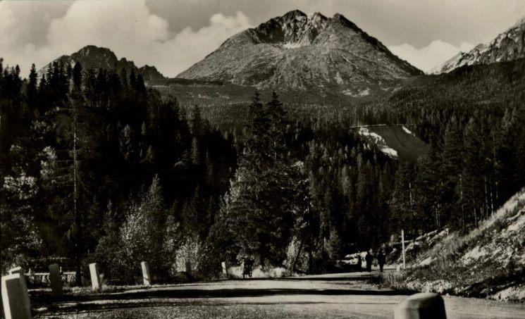 Cesta Slobody a Gerlachovský štít